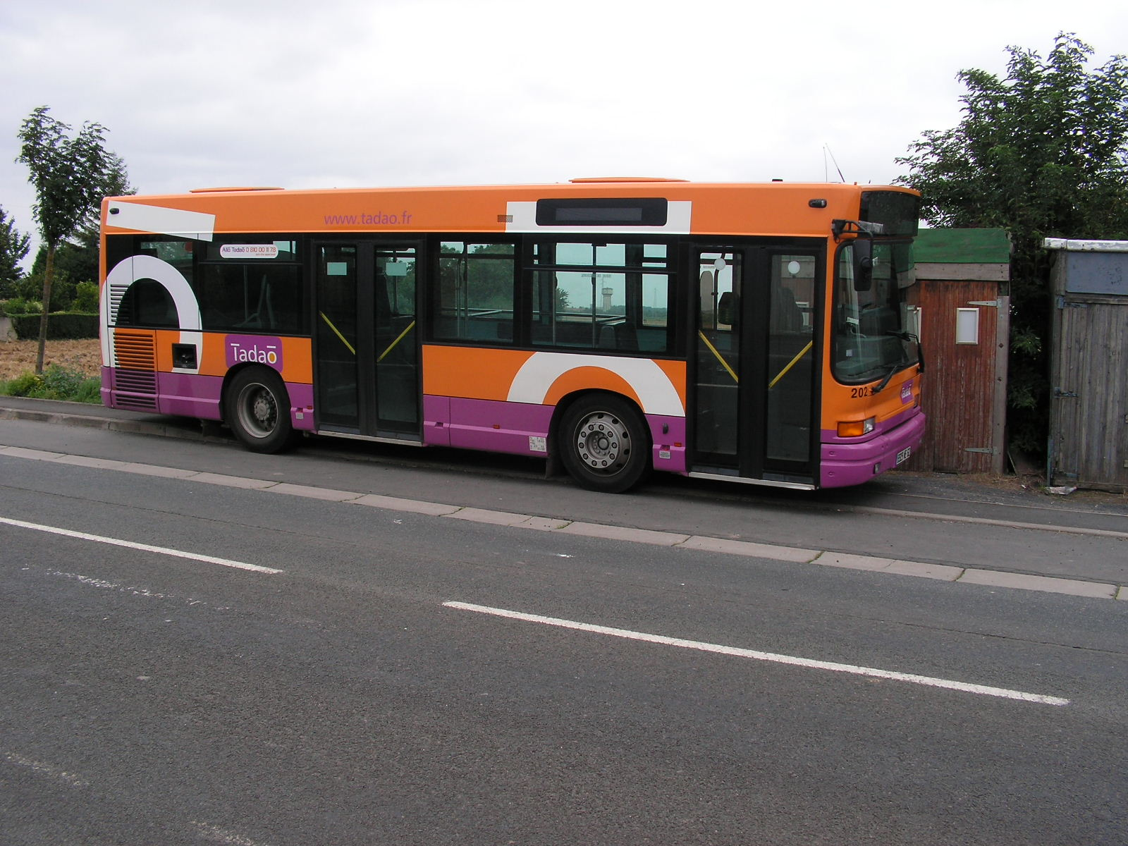 Bus Tadao